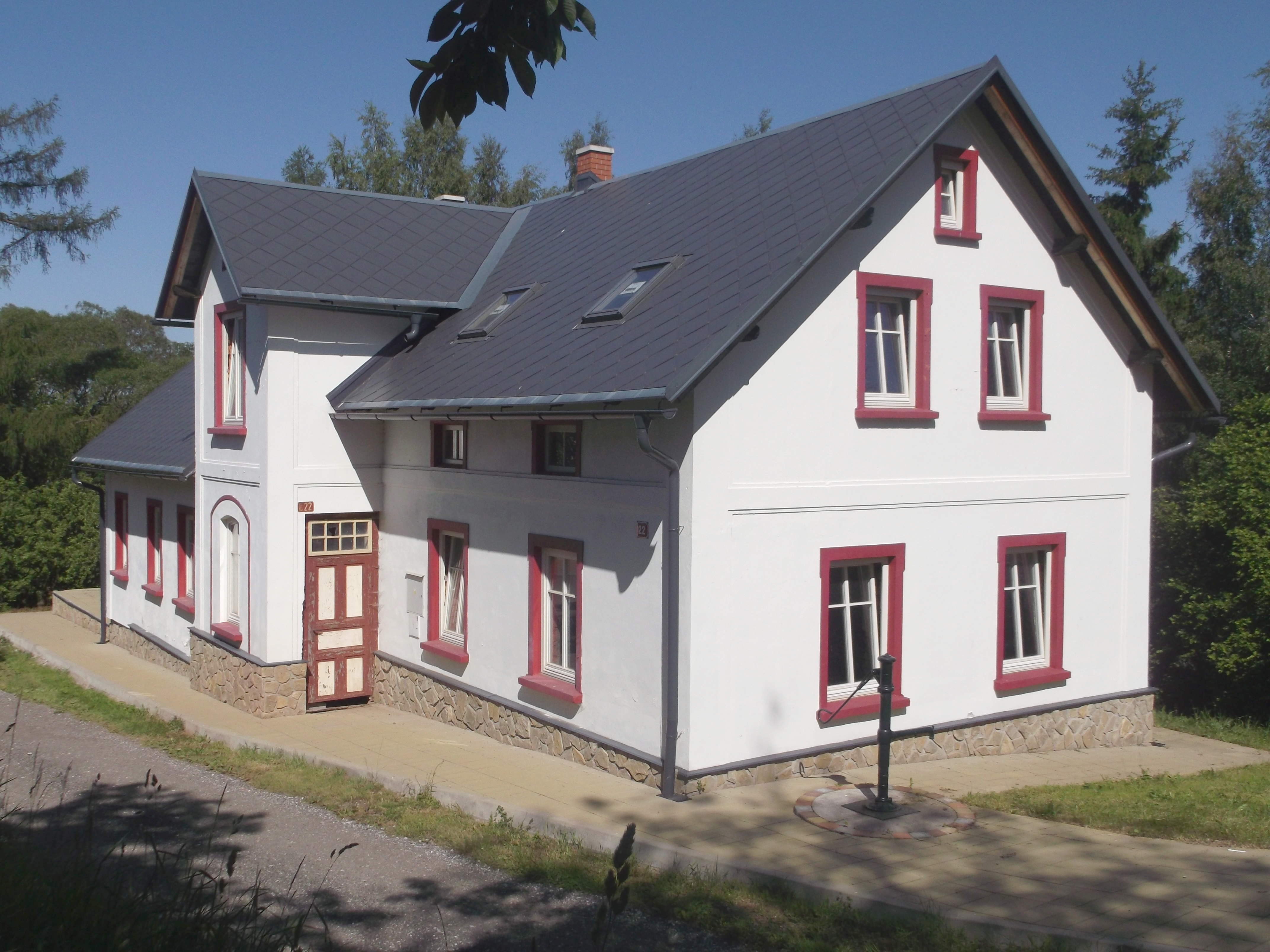 Hertvíkovice - č.p. 22